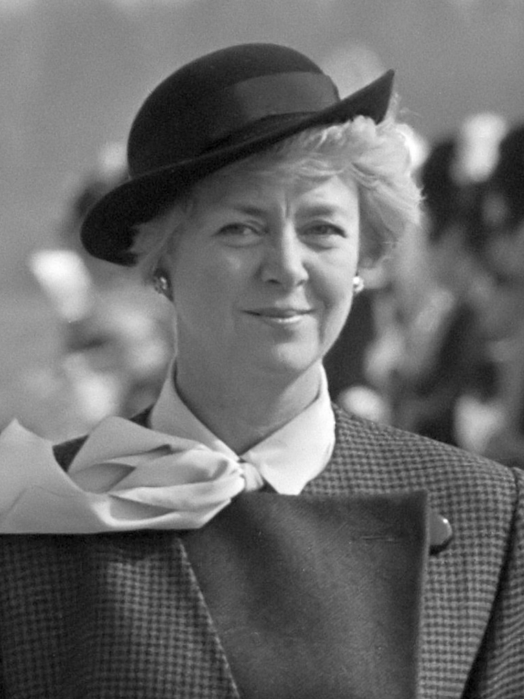 Bezoek president IJsland, mevrouw Vigdis Finnbogadottir inspecteert met Koningin Beatrix erewacht op Rotterdam Airport 19 september 1985